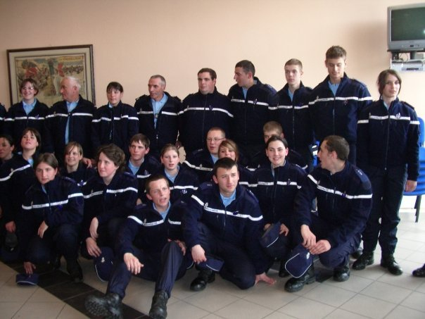 Peloton PMG 2009 in Mende (Lozère, France)